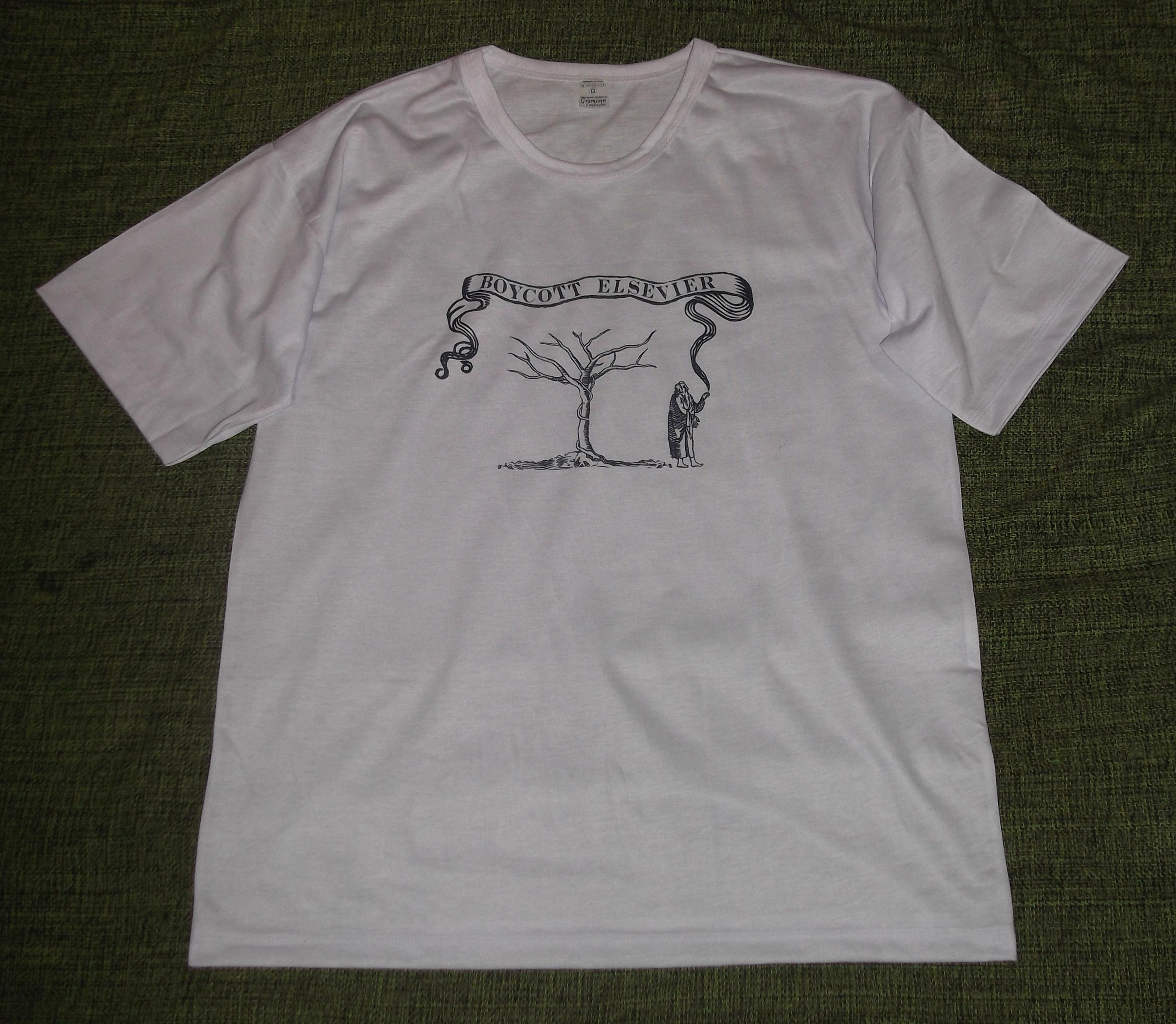 Camiseta: Boicote Elsevier